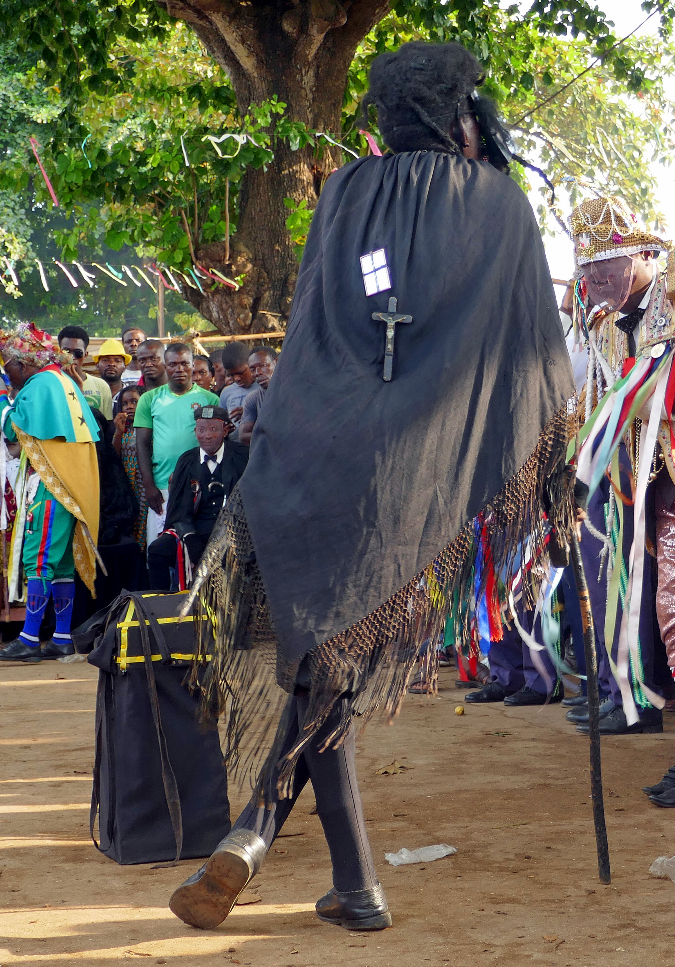 Tchiloli représenté devant l'église São Pedrão de São Tomé à l'occasion de la fête patronale. Renaud de Montauban virevoltant autour du cercueil.